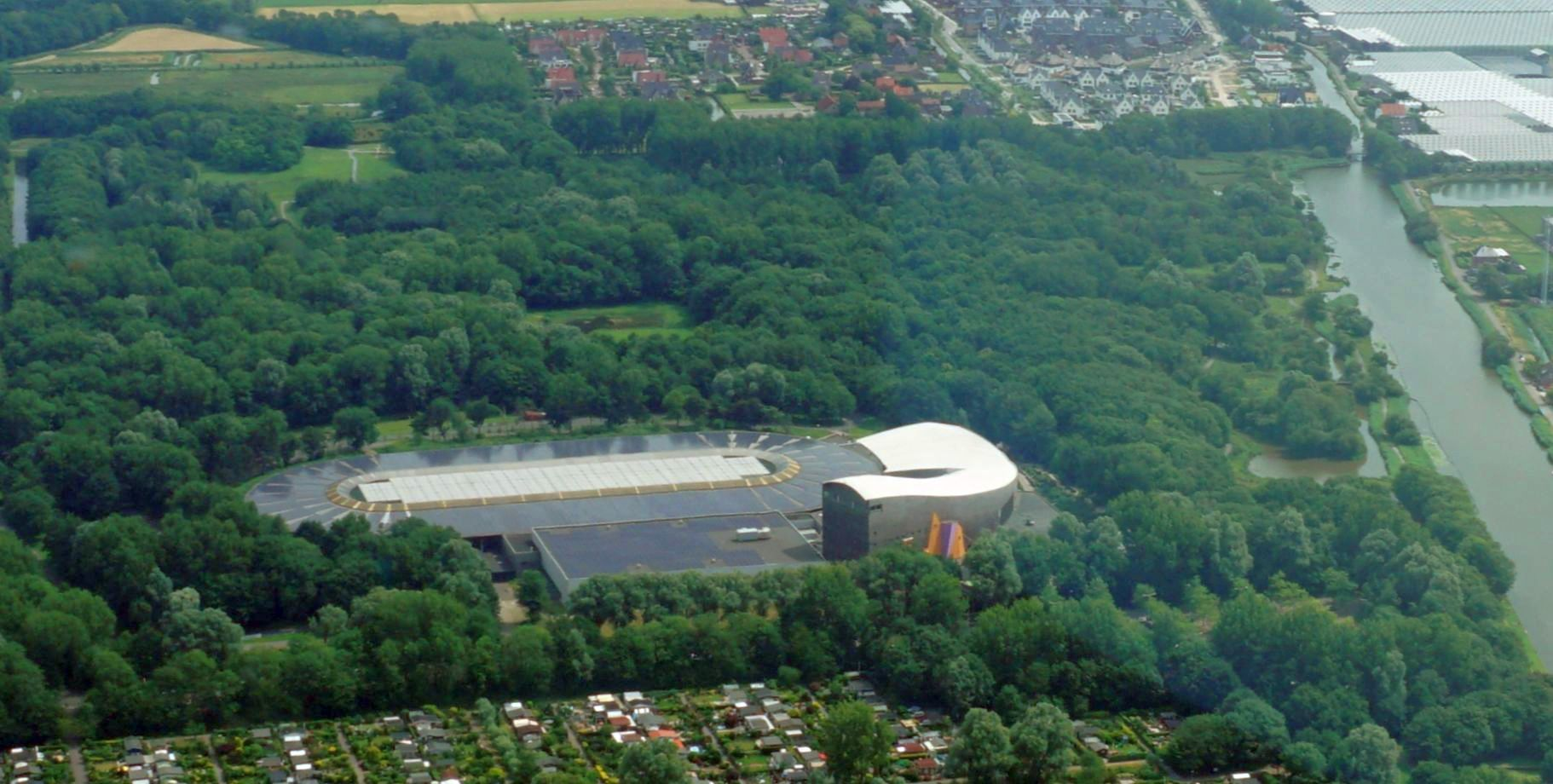 Schaatsbaan de Uithof op 30-06-2019 vanuit een Cessna 172